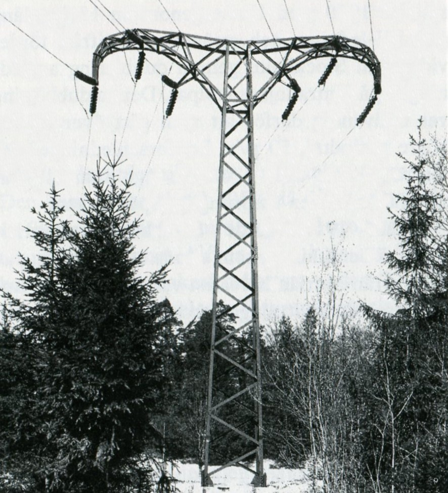 Kraftledningsstolpe, kraftledning från Untran till Stockholm